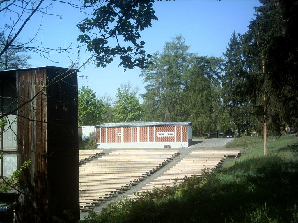 Hradec Králové, letní kino Širák